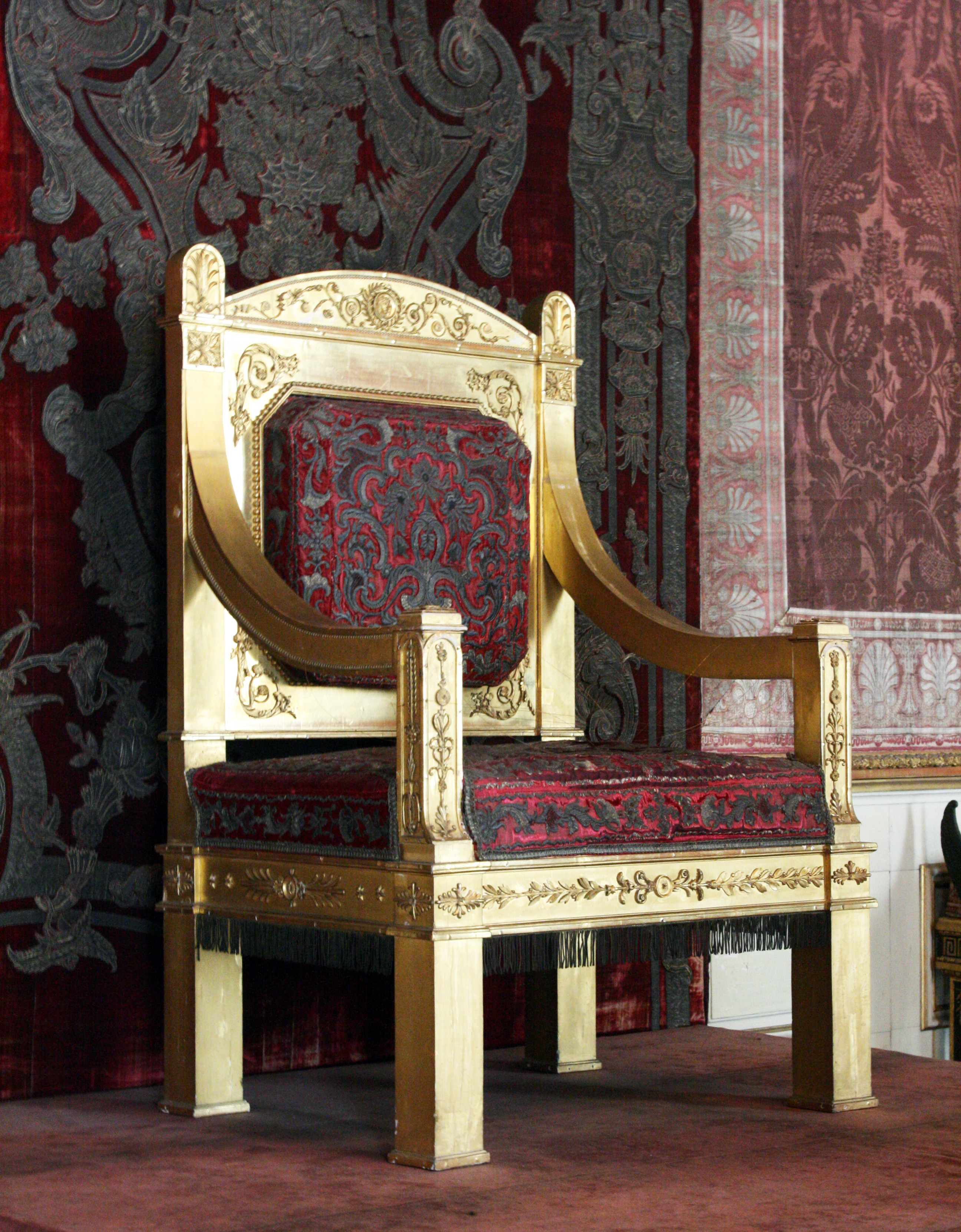 Königsthron, extra für Napoléon Bonapartes Besuch in Stuttgart gefertigt. Stand ursprünglich im Neuen Schloss in Stuttgart. Der Thron gefiel König Friedrich I. von Württemberg und wurde deshalb in das Residenzschloss Ludwigsburg gebracht. Aufgenommen im Schloss Ludwigsburg.